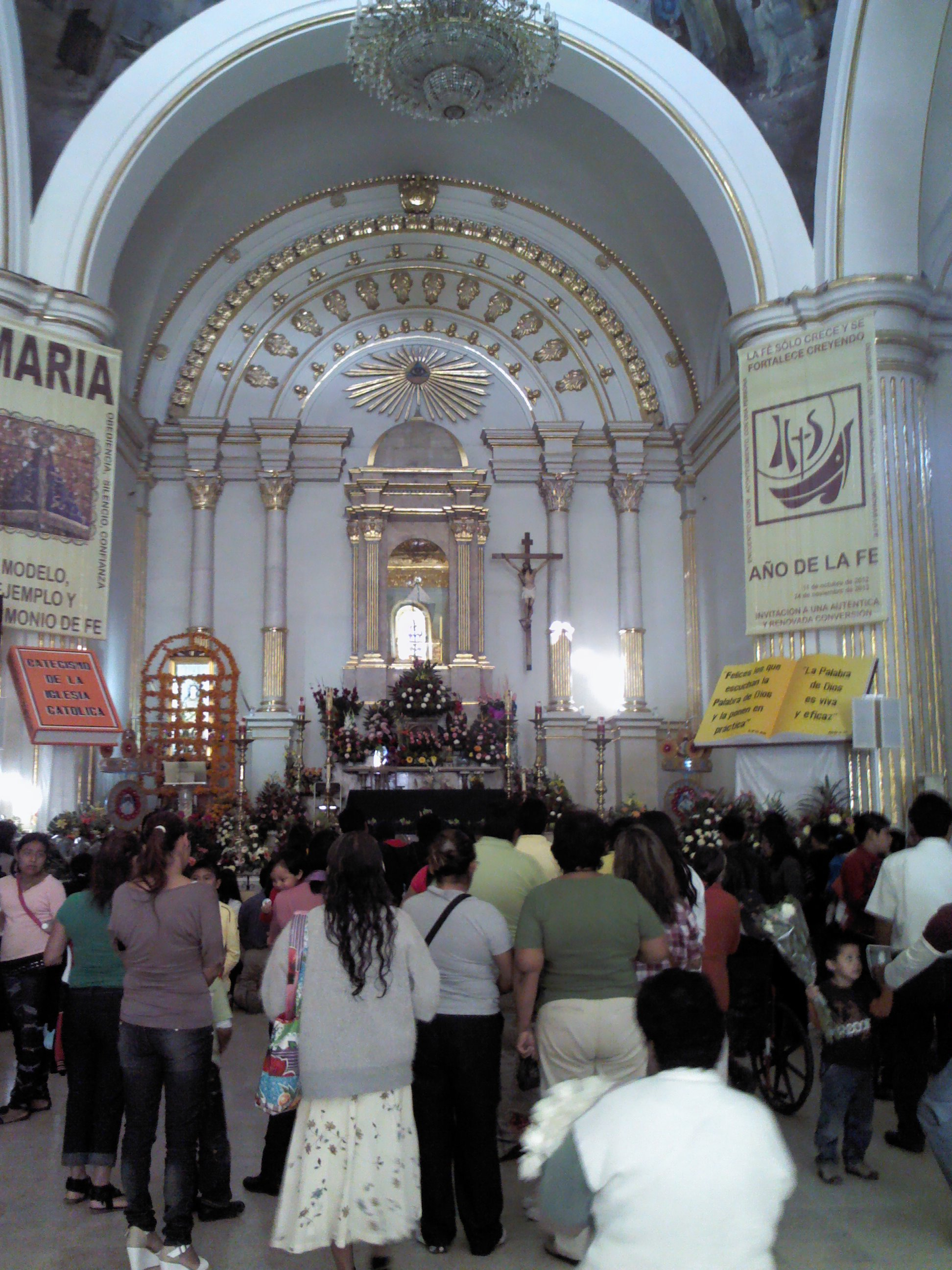 Los peregrinos en la capilla de la Virgen de Juqila